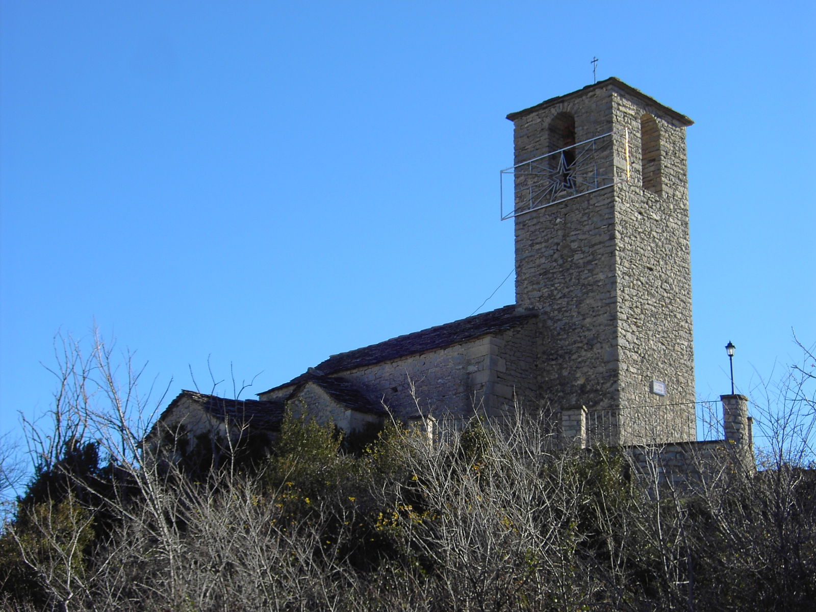 Church in Paulés de Sarsa, Huesca, Spain.